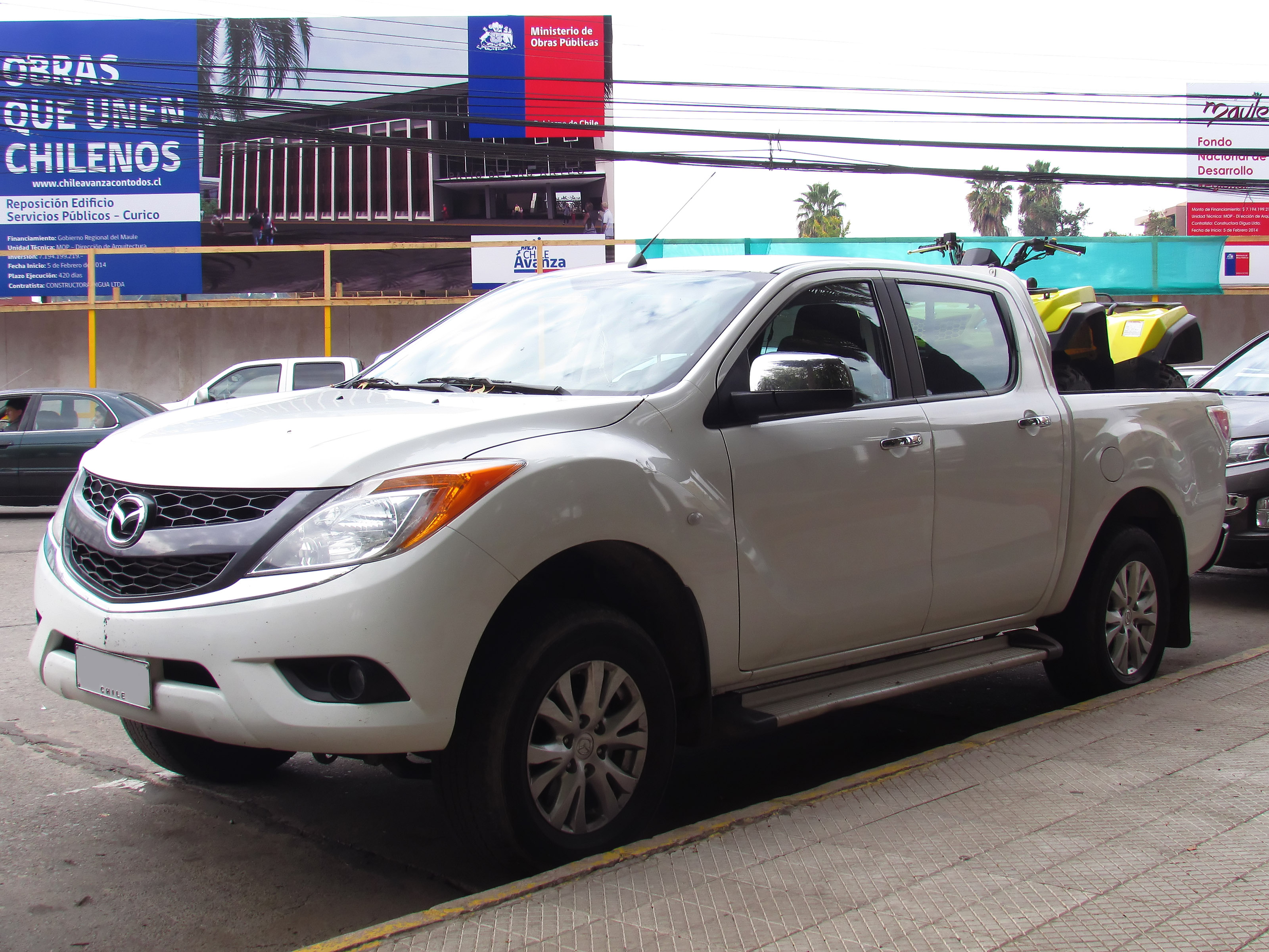 Mazda BT-50 SDX 2.2 TDCi 4x4 2013